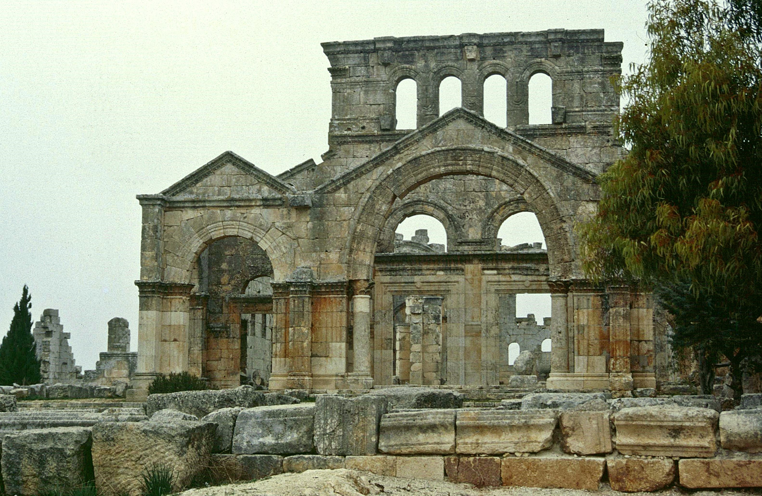 Vorderseite des Simeonskloster in Nordsyrien